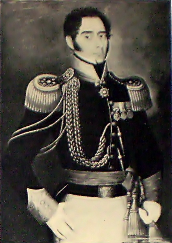 Juan Gregorio Las Heras